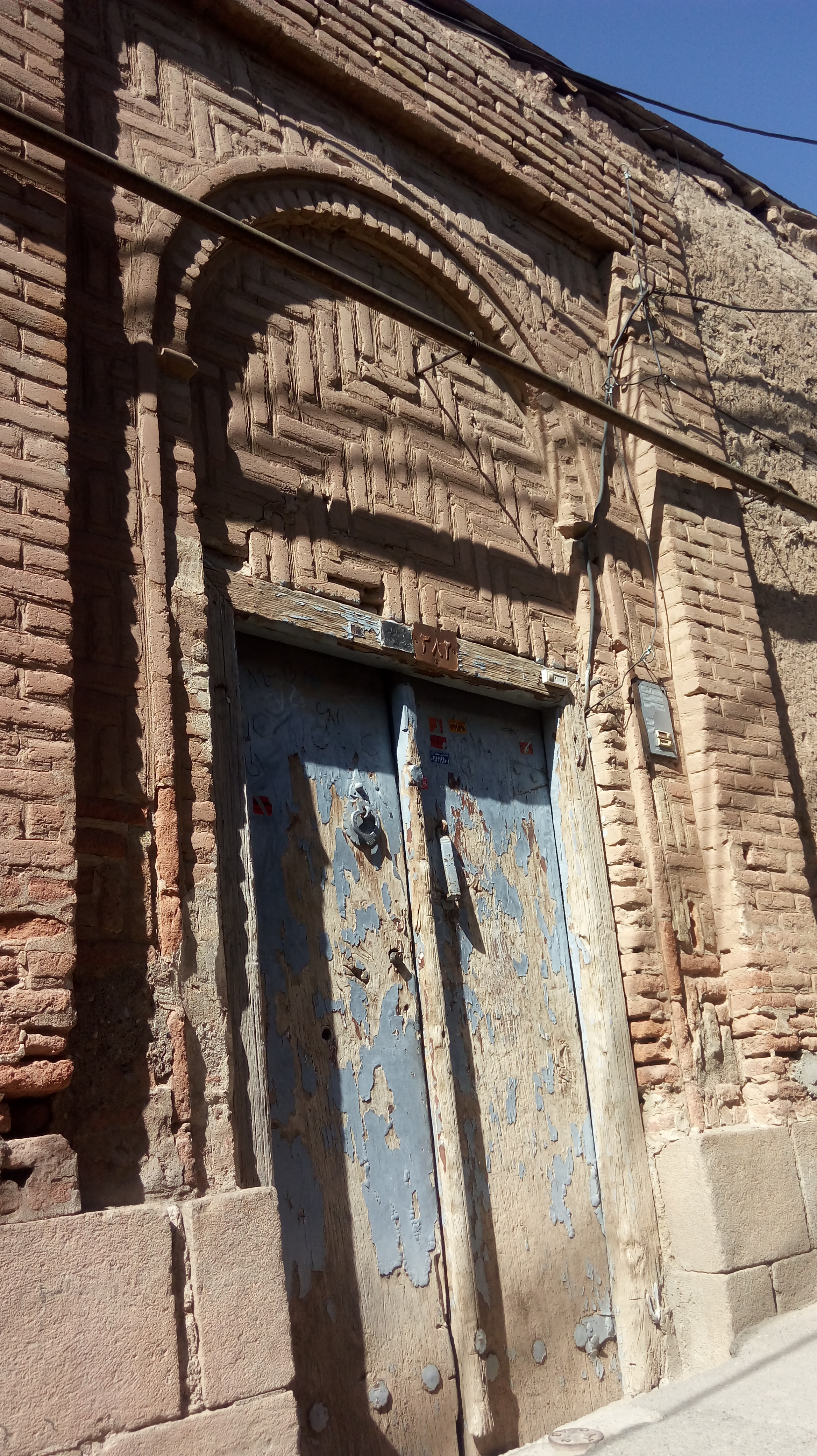 سردرب عمارت تهرانچی(ناصری ) در قراملک تبریز